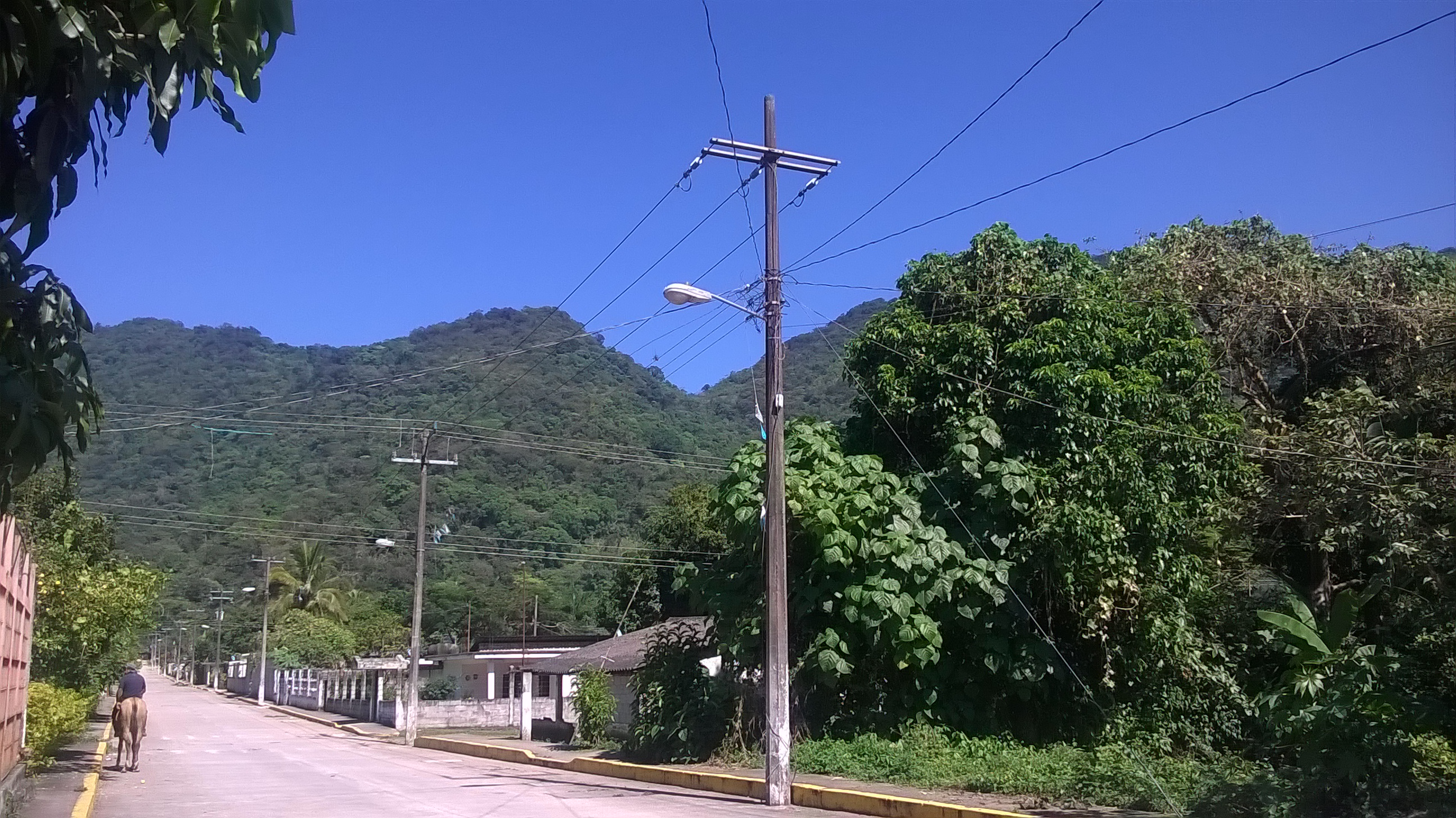 Campo Grande, localidad de Ixtaczoquitlán, Veracruz